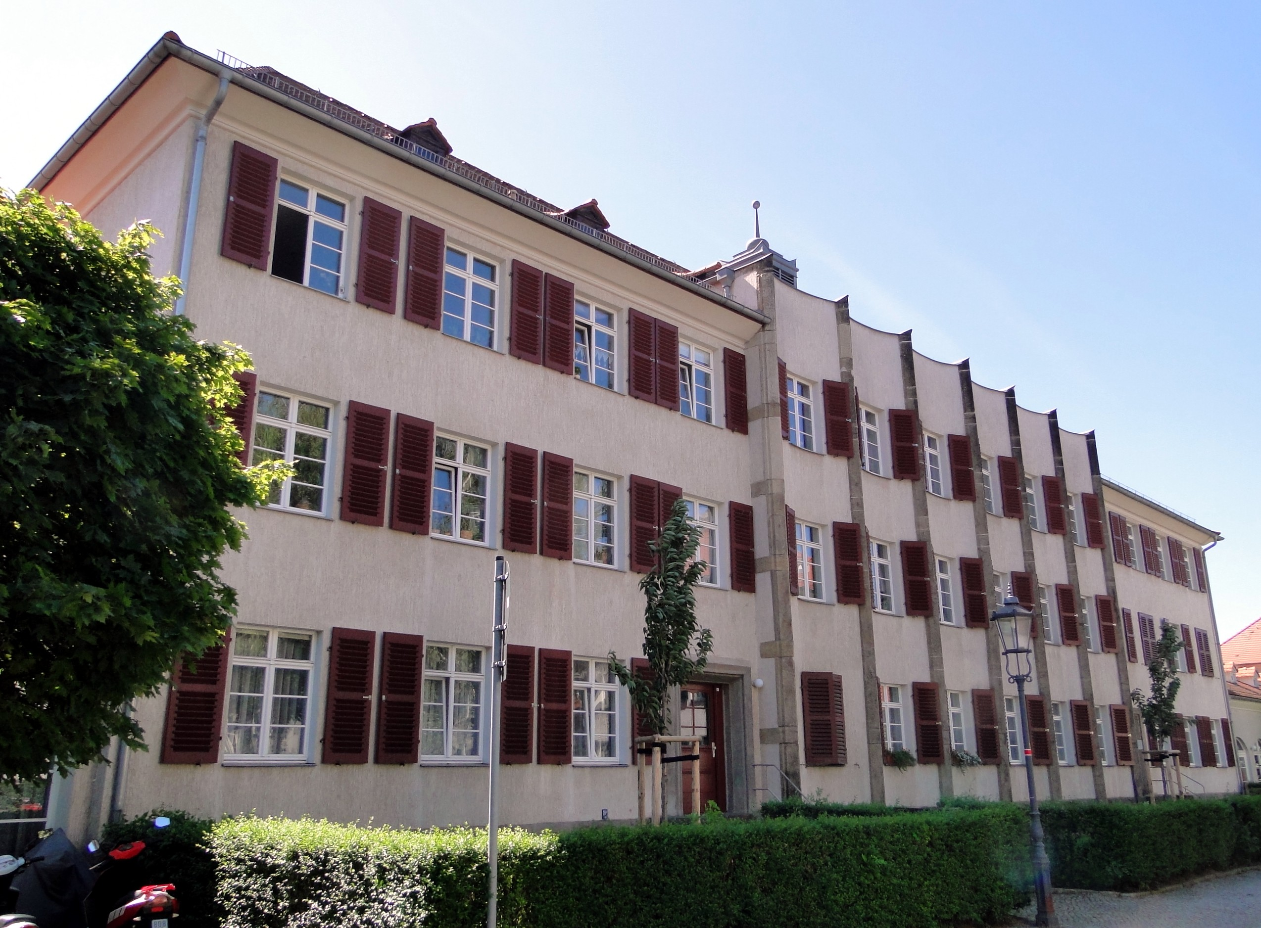 Verwaltungsgebäude „Rathaus“.